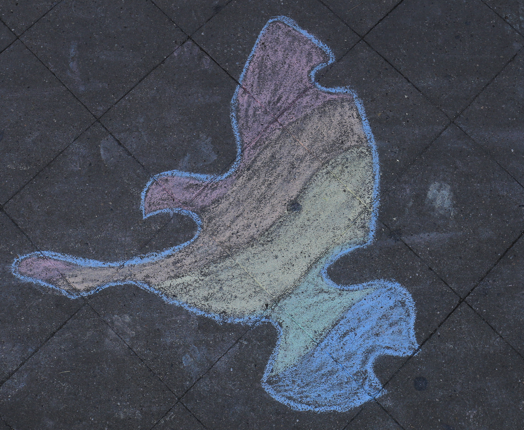 Am 15. September 2018 haben Köthener den Marktplatz mit Kreide bunt bemalt. Die sollte ein Zeichen gegen die später stattfindende rechte Demonstration sein. Die Kirchengemeinde Köthens sowie verschiedene Vereine hatten dazu aufgerufen.